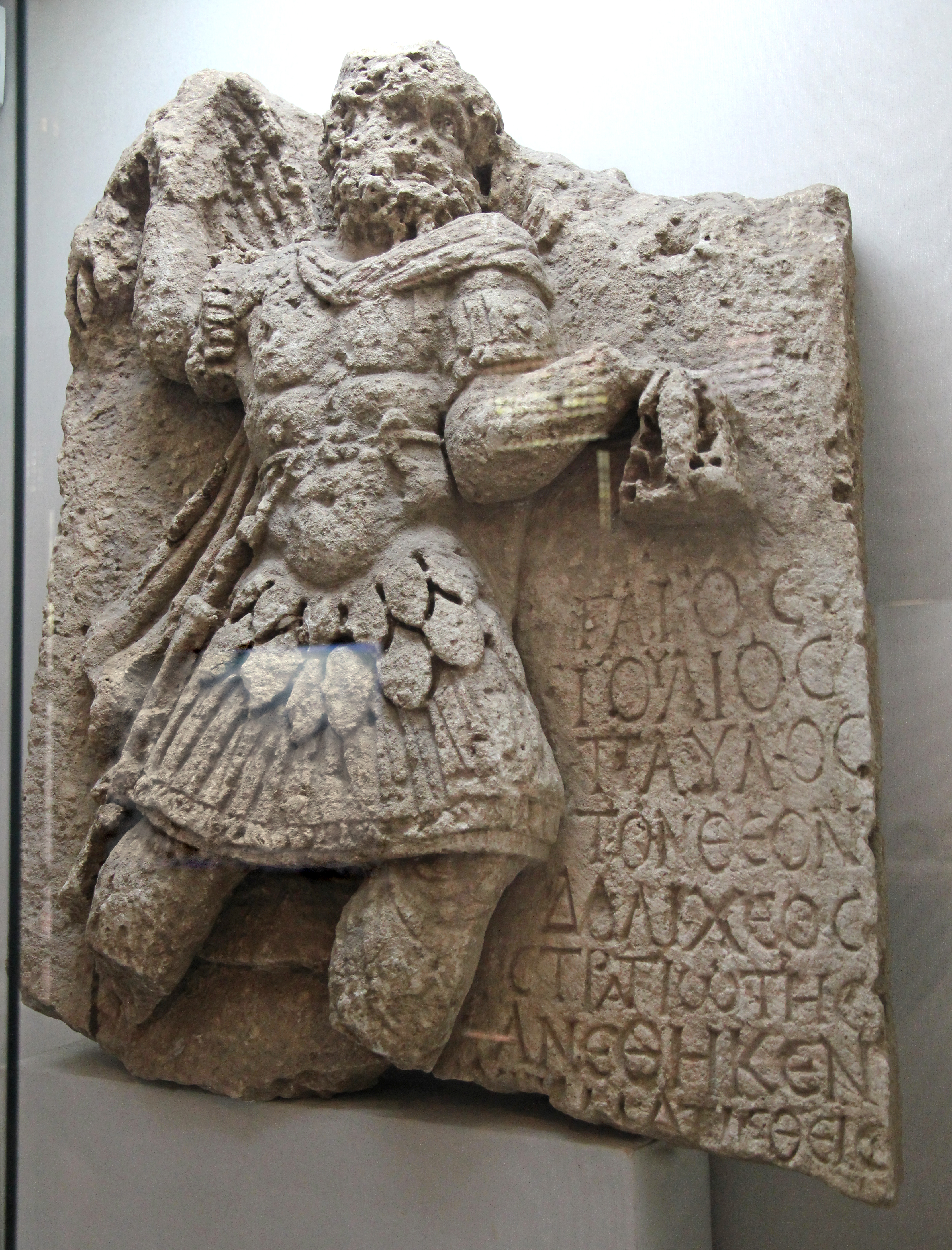 Weihrelief des Jupiter Dolichenus aus Perrhe, im Museum von Adıyaman, Türkei